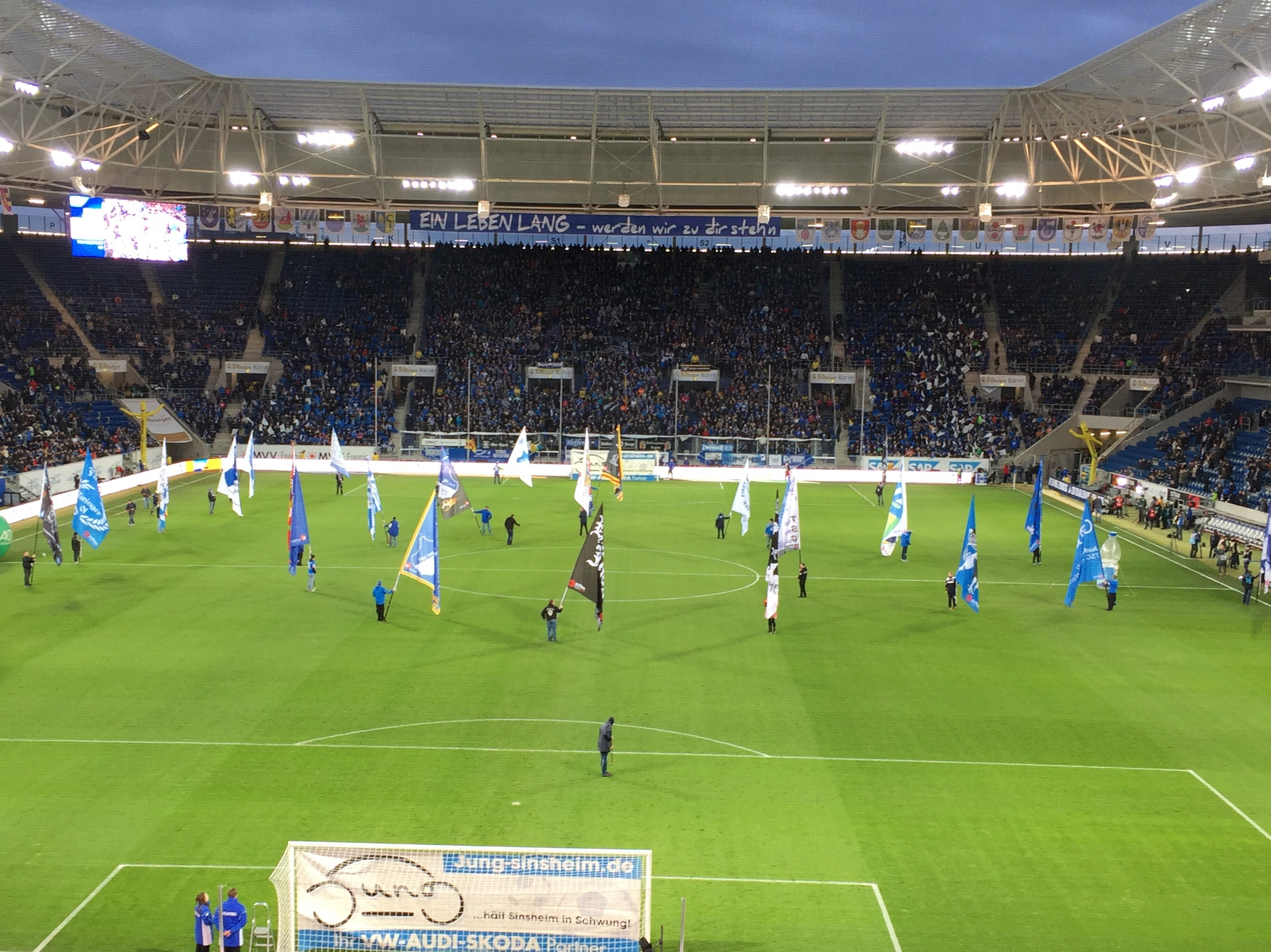 Avant match du TSG Hoffenheim 1899.